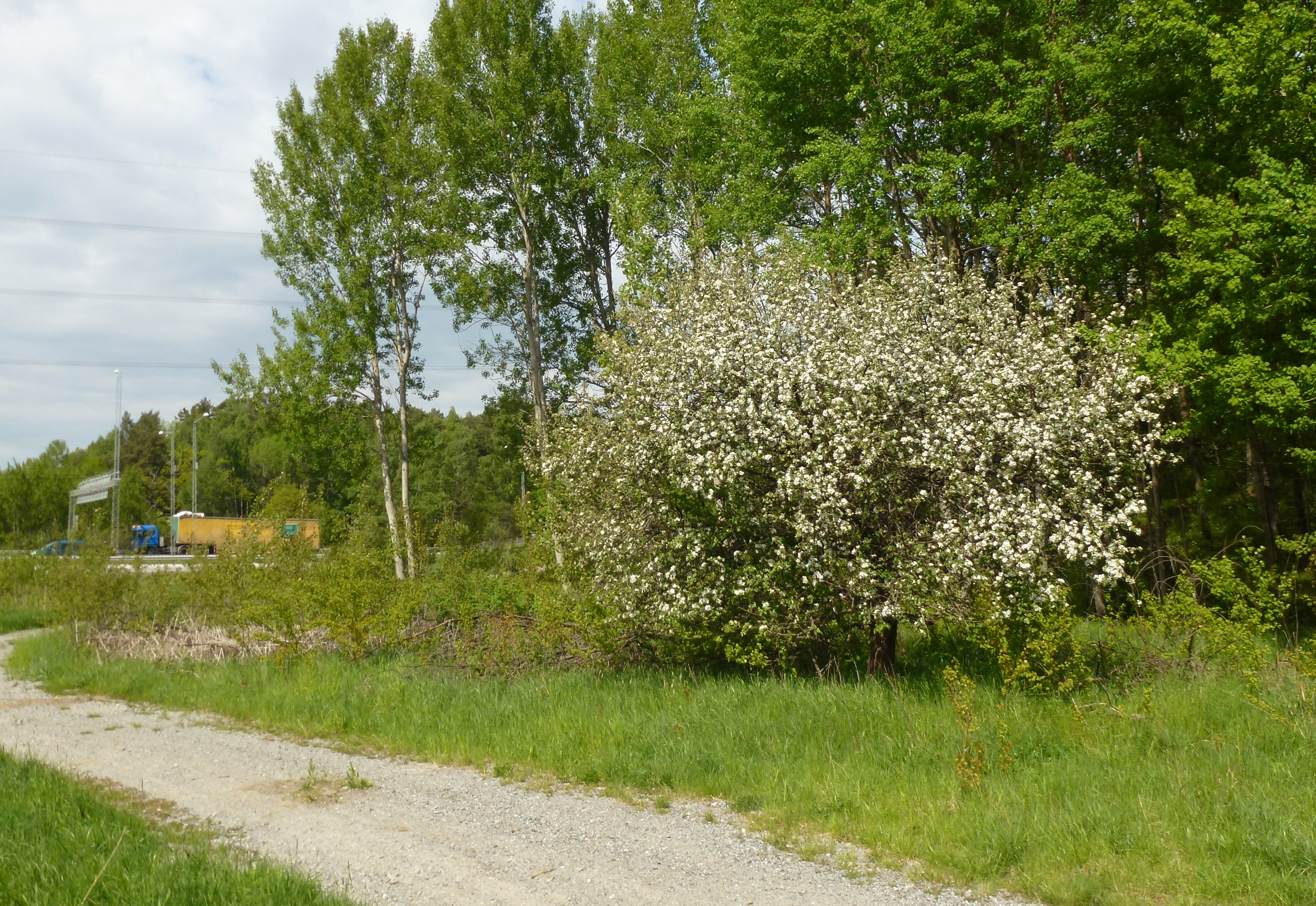 Blommande äppelträd vid det tidigare torpet "Månskär" i Segeltorp, i bakgrunden syns motorvägen E4/E20.